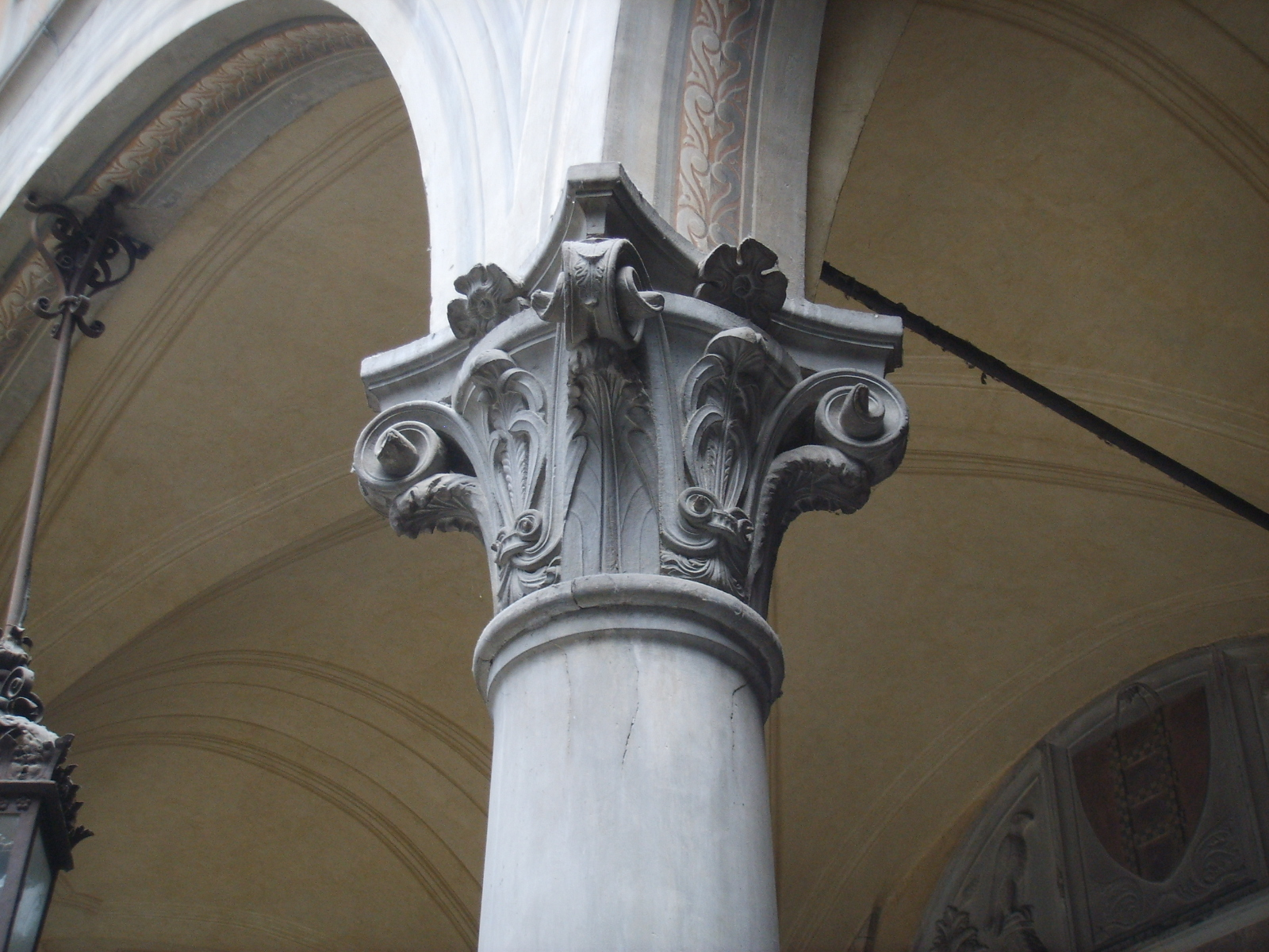 Basilica della santissima annunziata, chiostrino dei voti, capitello